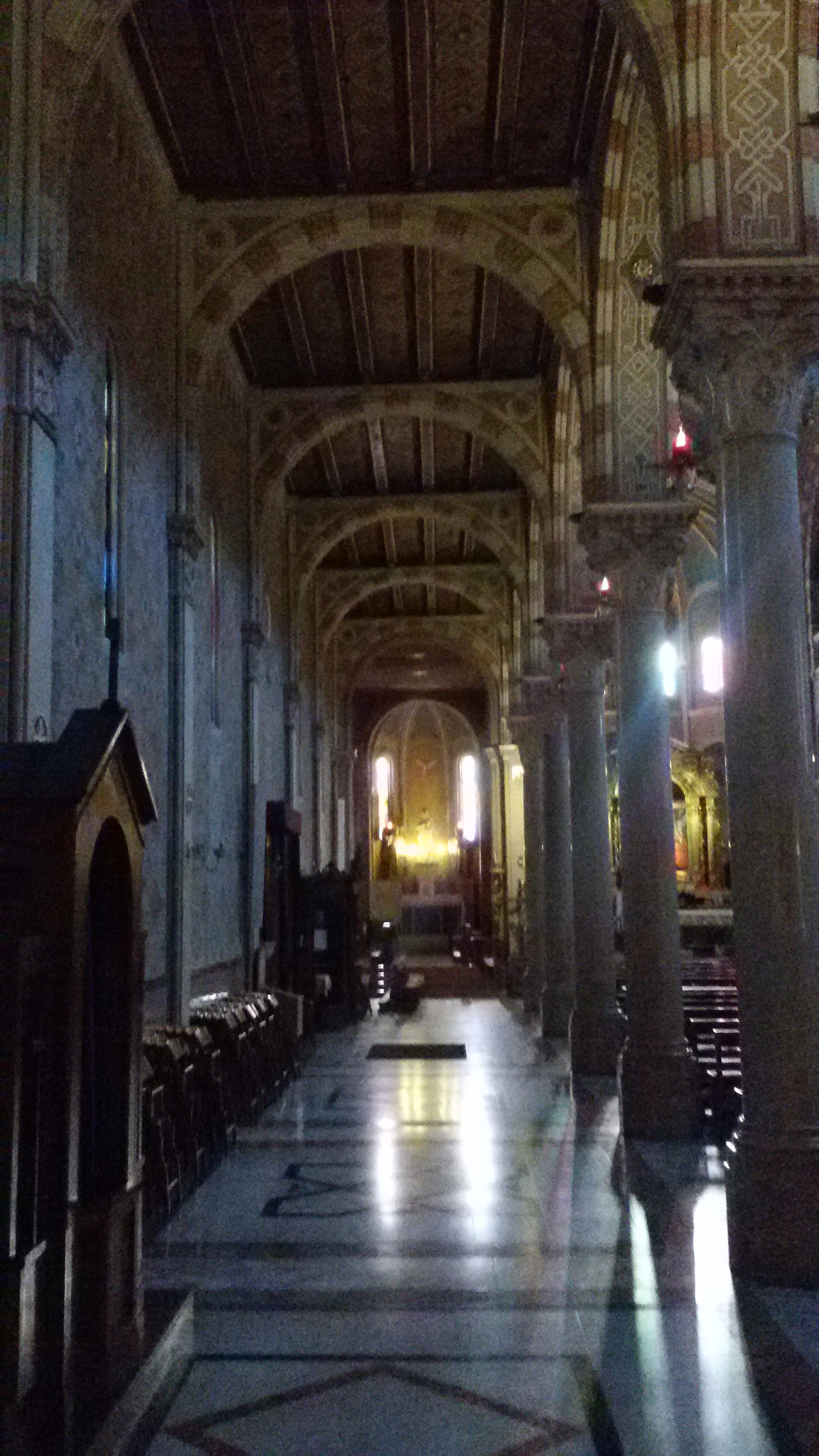 Chiesa di Santa Cristina Quinto di Treviso